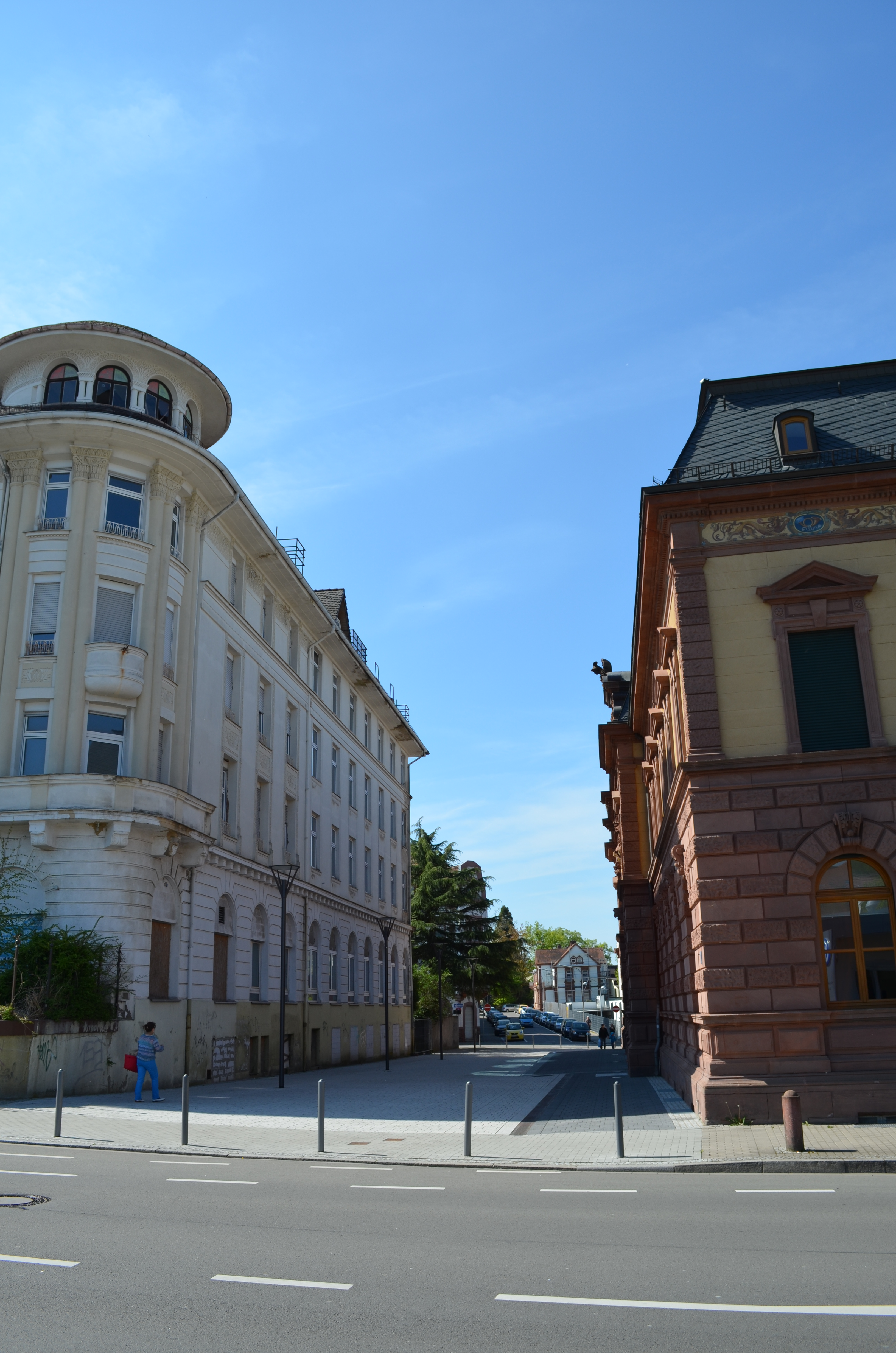 Ansicht der Poststraße in Pirmasens im April 2014: Rechts das Forum Alte Post, links das Hotel Matheis kurz vor seinem Abriss